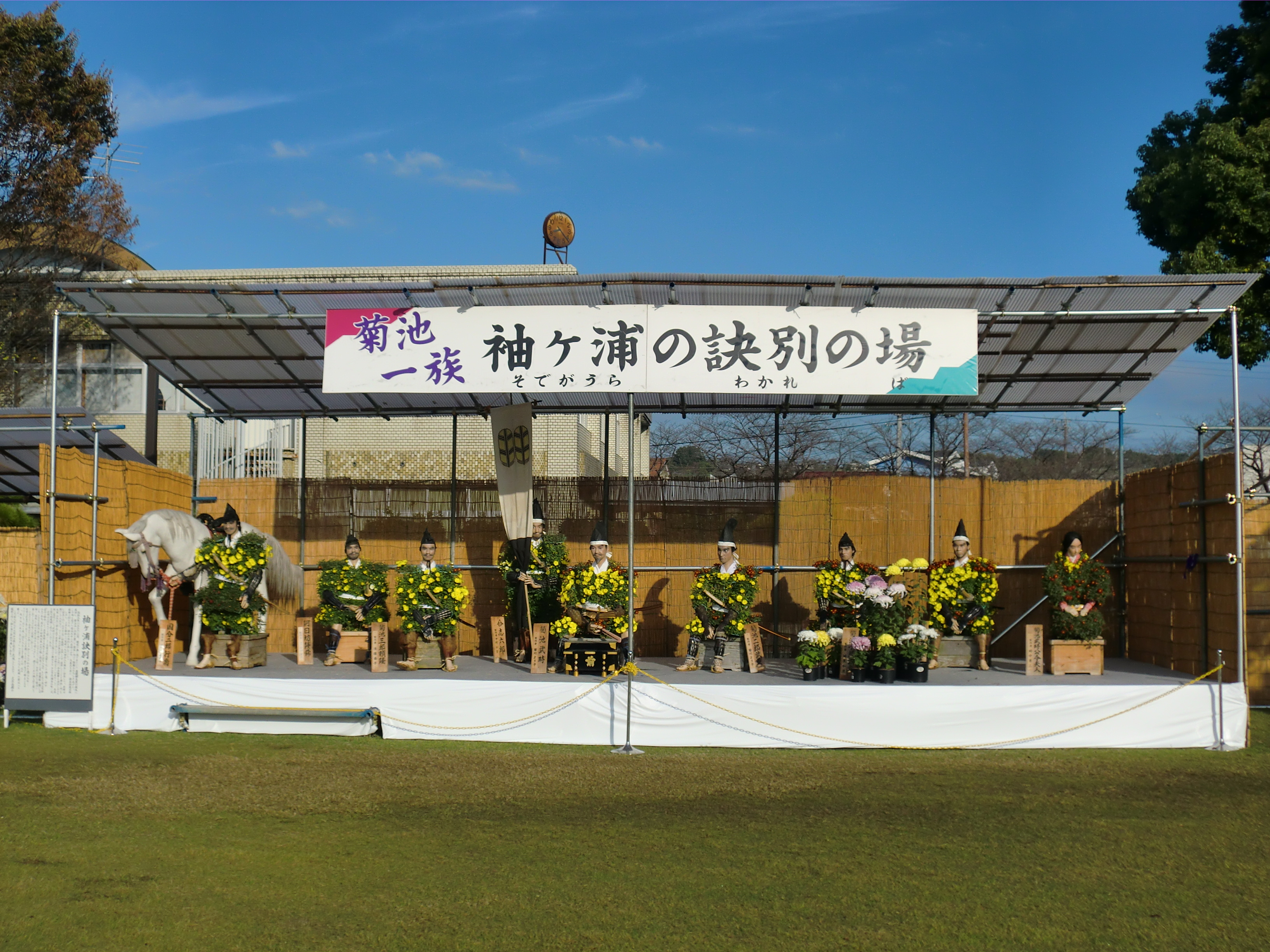 熊本県菊池市で開催される菊人形・菊祭り